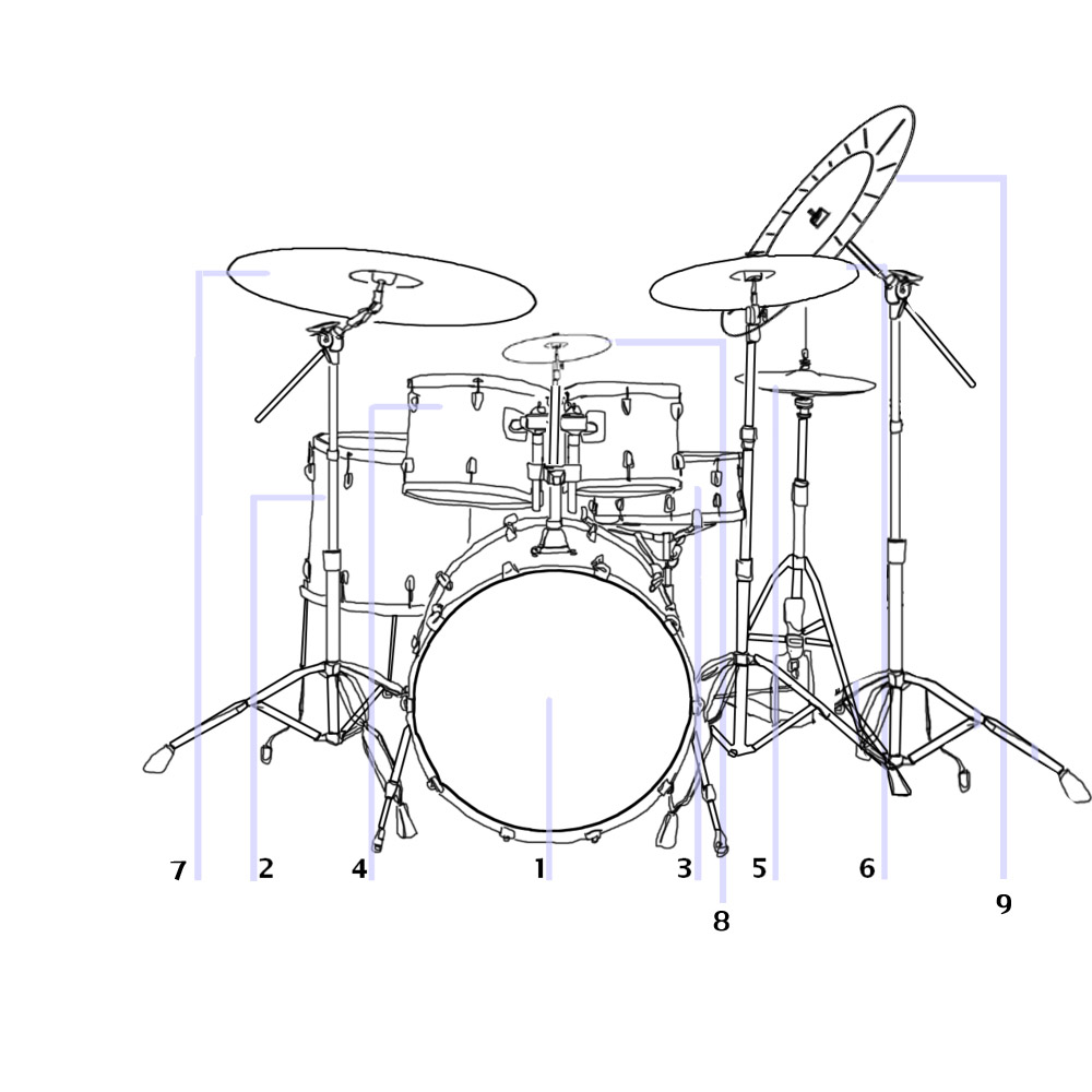 ציור של מערכת תופים